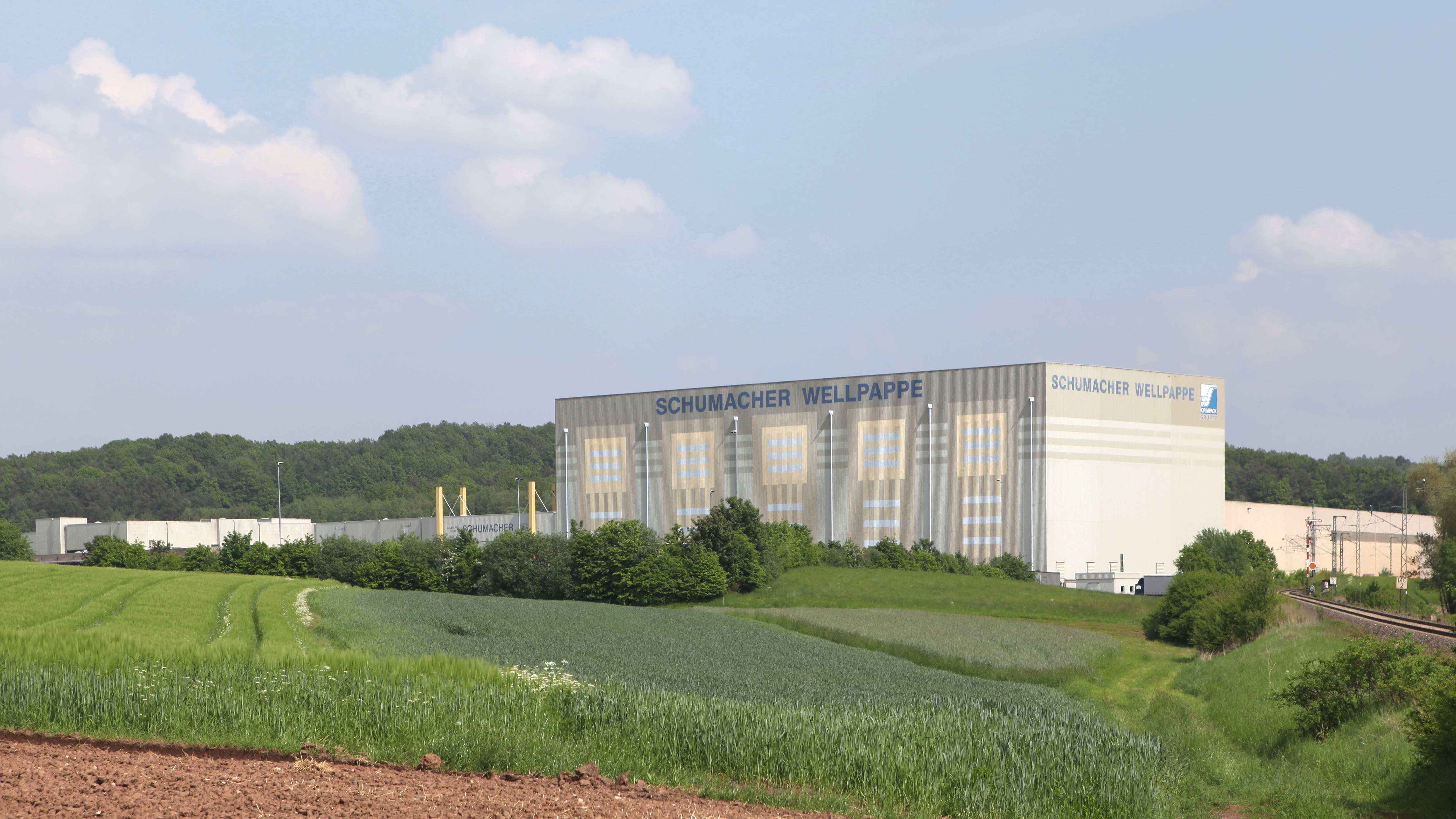 Schumacher Packaging in Ebersdorf, Landkreis Coburg